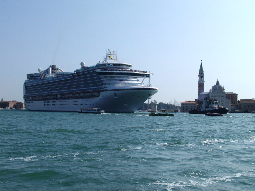 Das Mega-Kreuzfahrtschiff 'Ruby Princess' fährt durch den Canale Della Giudecca, Venedig; 09.2011